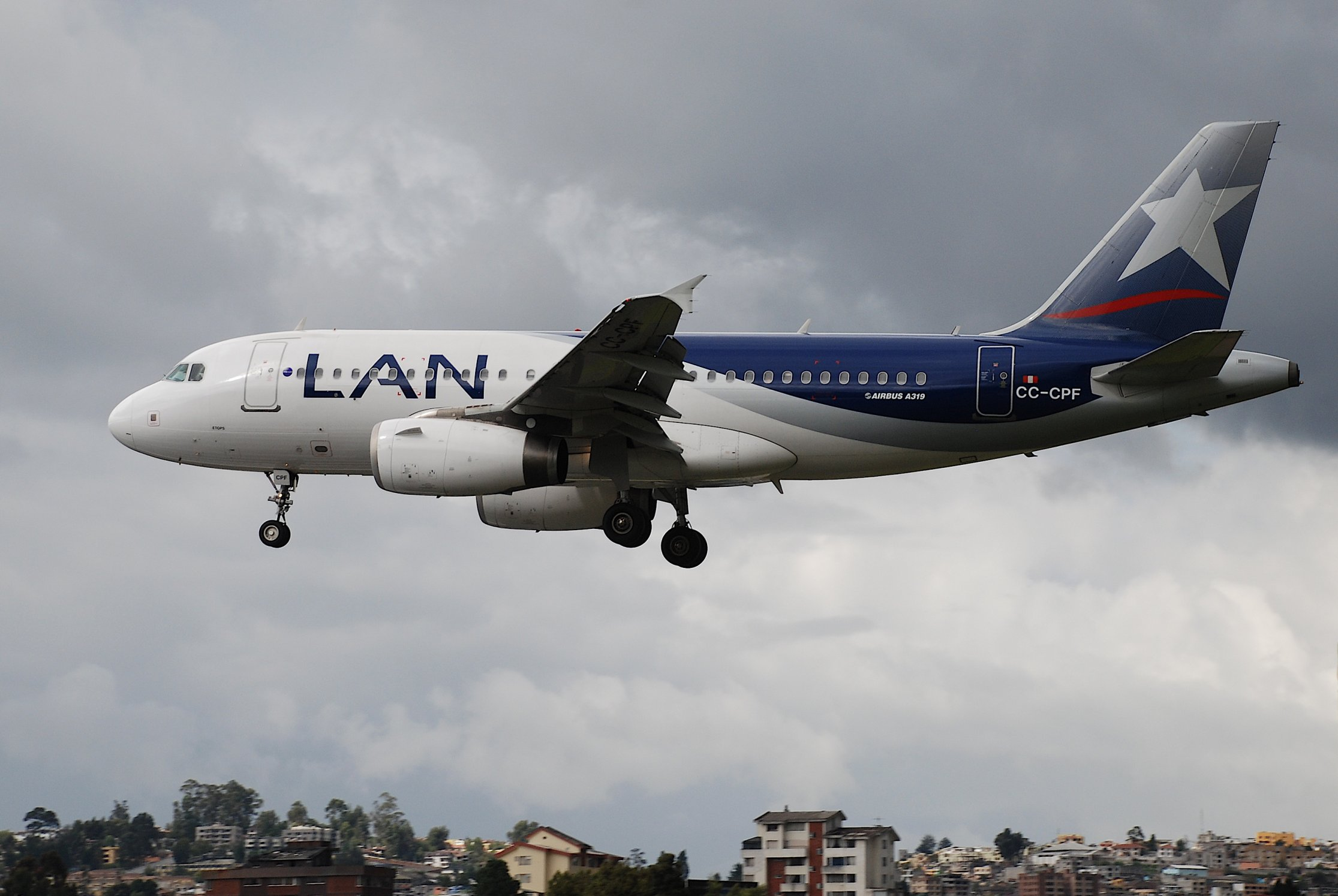 LAN Airbus A319-132; CC-CPF@UIO;23.06.2008/515ee